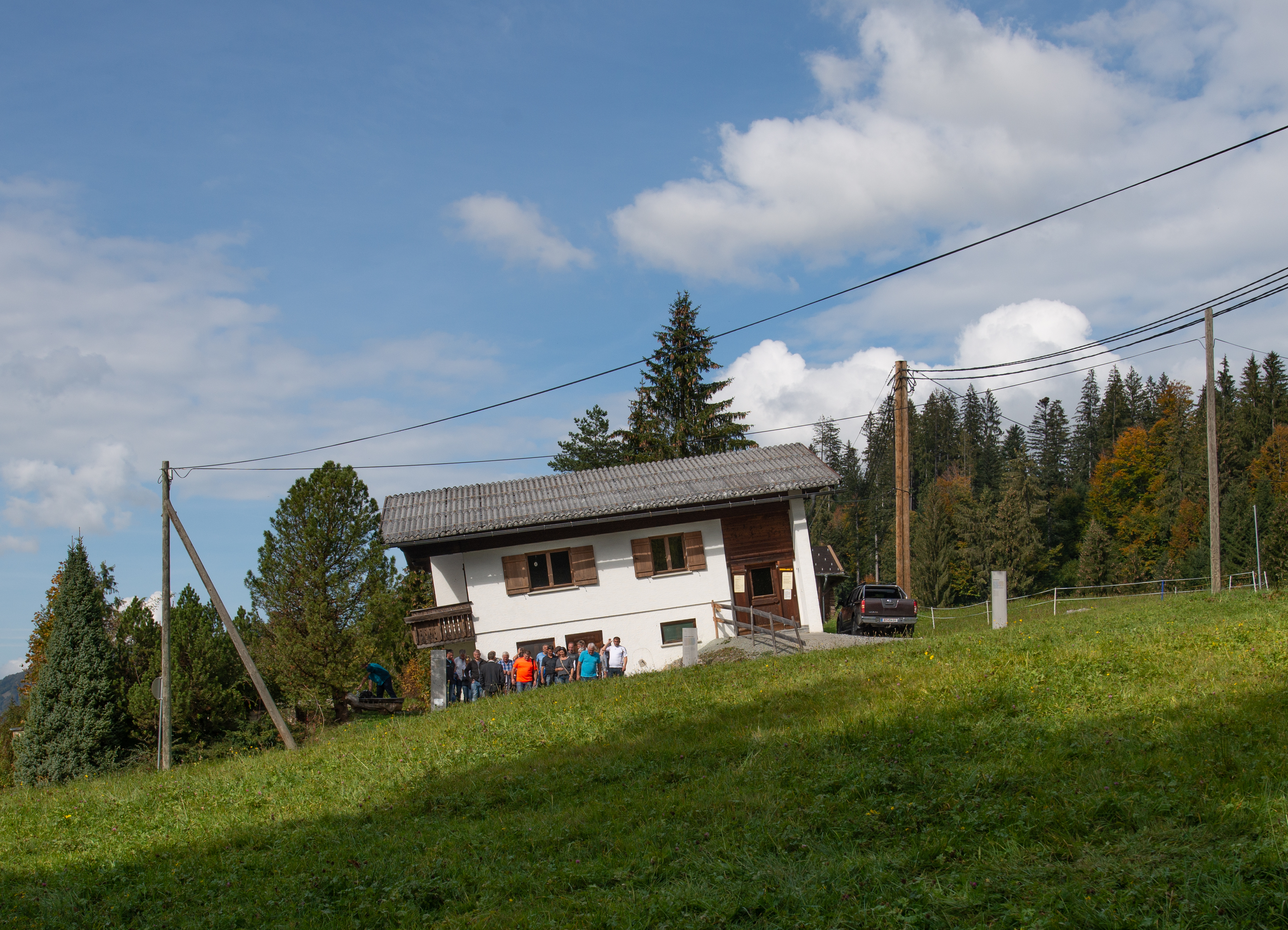 die Georunde Rindberg in Sibratsgfäll. Ausgehend von "Felbers schiefem Haus" (im Bild) wurden acht Objekte in der Hanglandschaft angeordnet, welche das Leben in der Schräge, die Kraft der Natur und die hier besonders notwendige Akzeptanz der steten Veränderung erfahrbar machen.